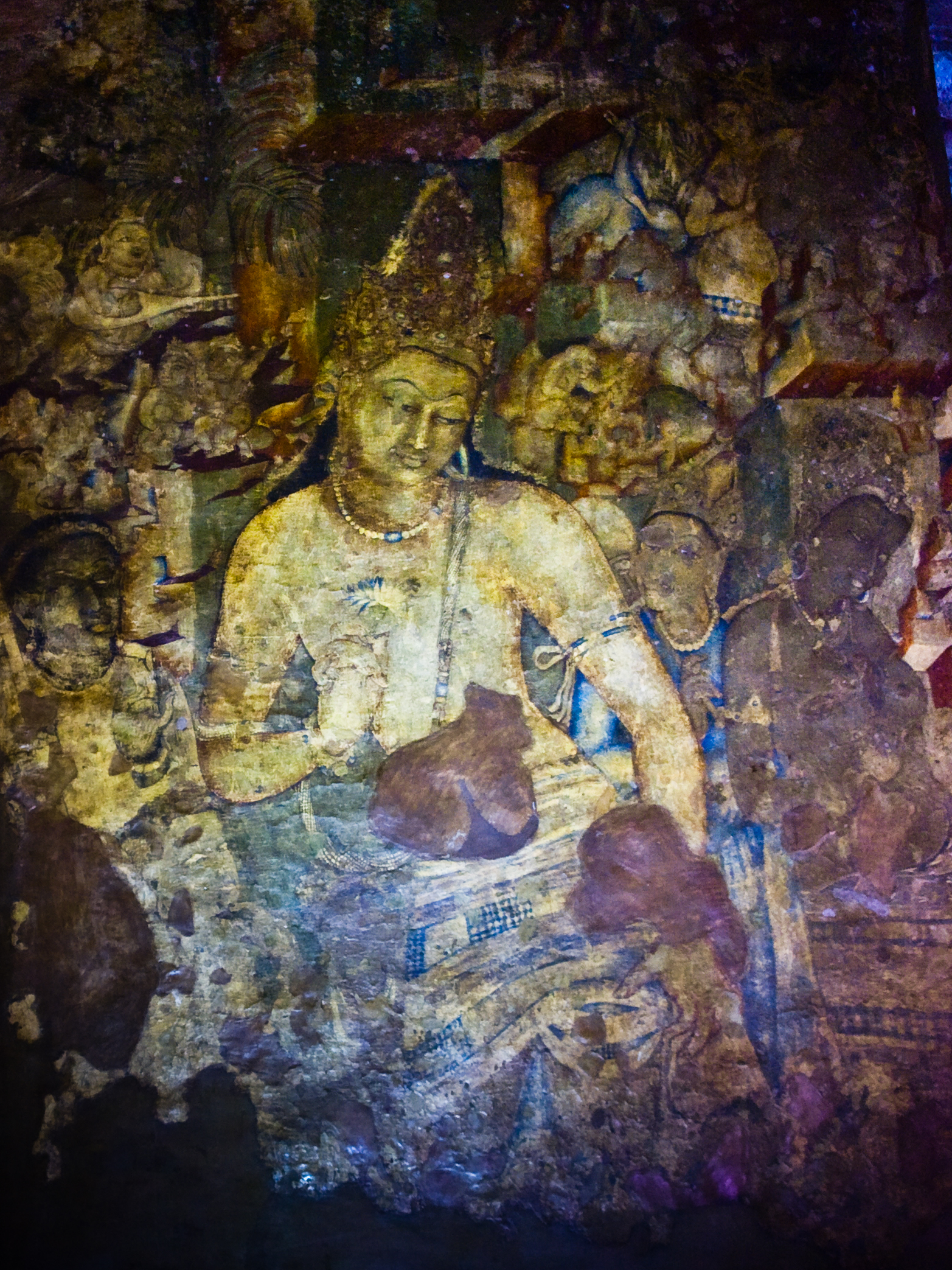 Avalokiteśvara / Padmapani, Ajanta Caves